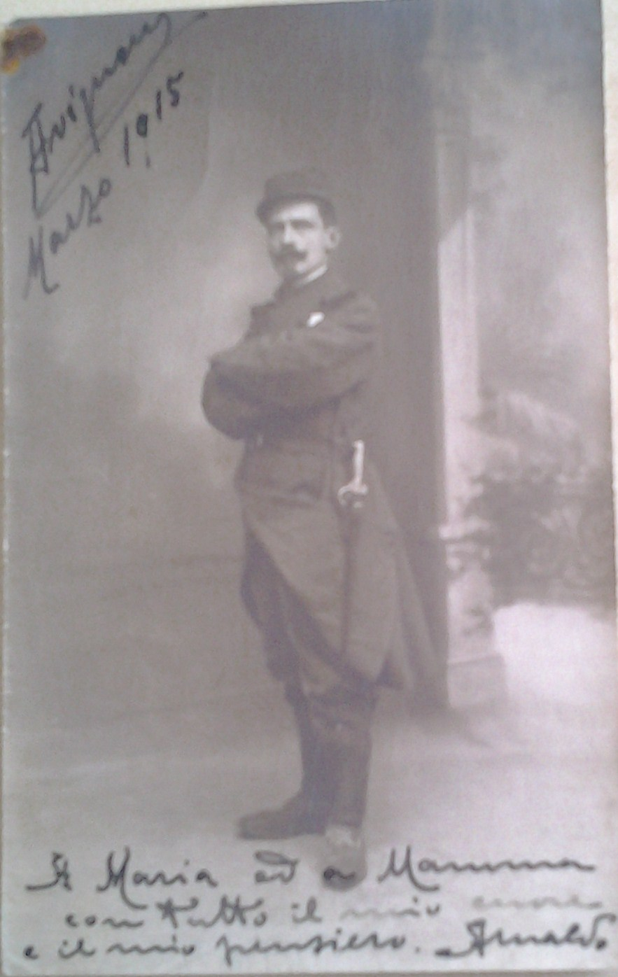 Arnaldo de Mohr nel 1914 con la divisa francese